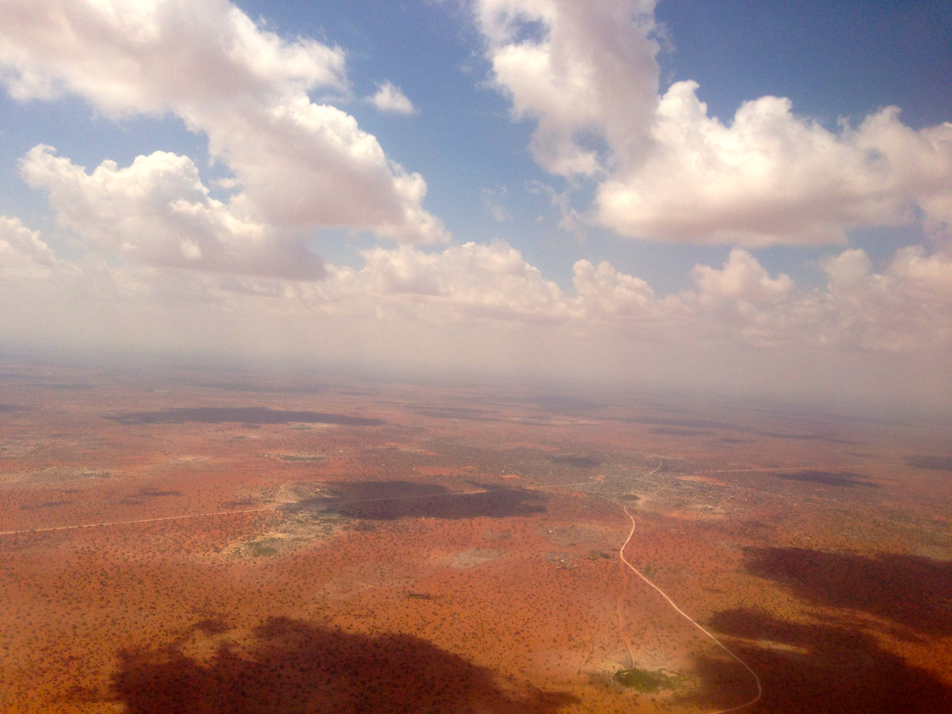 ვაჯირი თვითმფრინავიდან